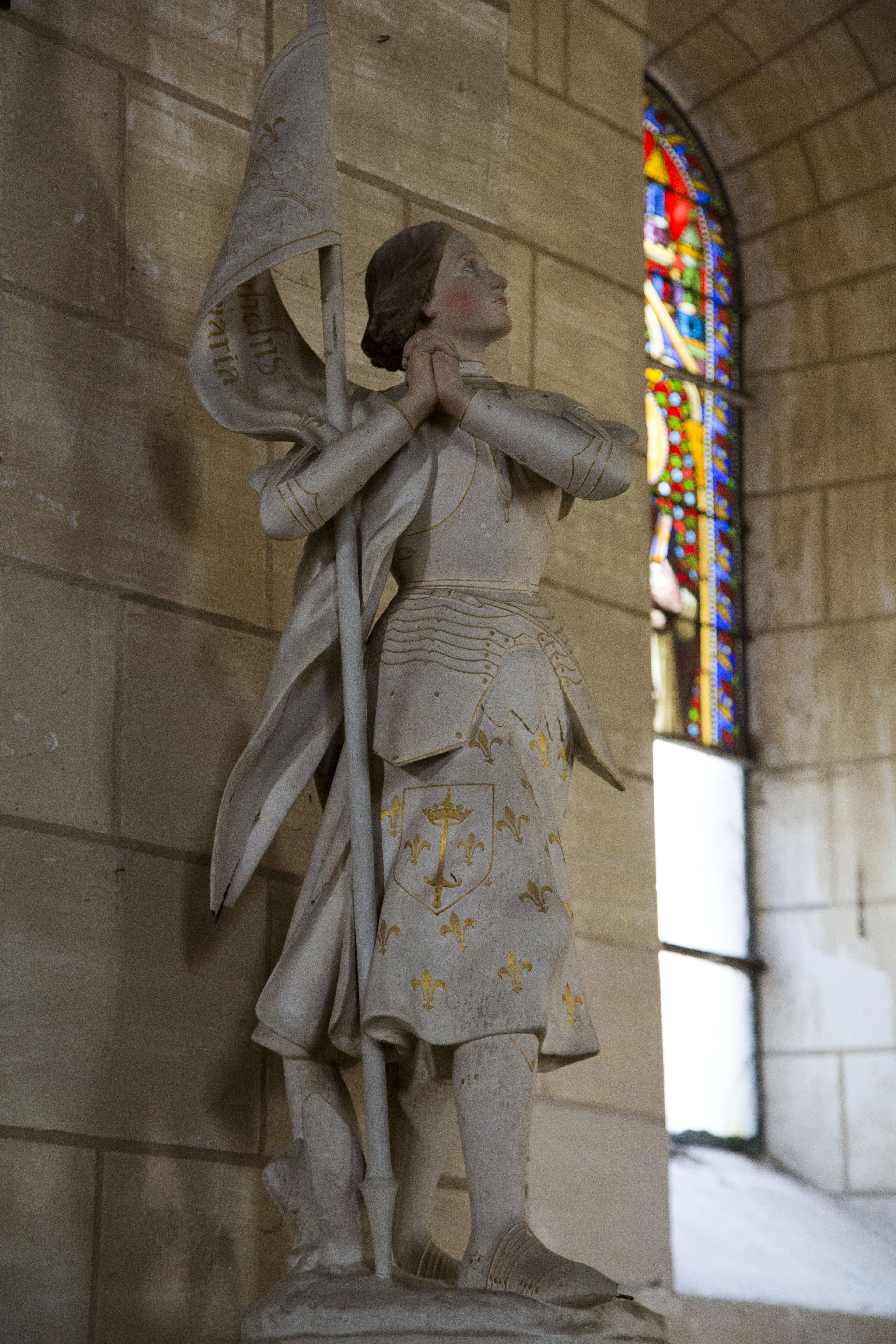 Statue en pied de Jeanne d'Arc en armure, dans l'église de la Madeleine de Moisy (Loir-et-Cher, France) .